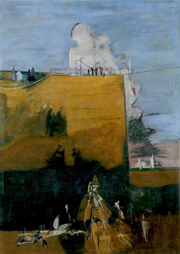 Walter Kurt Wiemken: Am Rande des Abgrunds (1936)